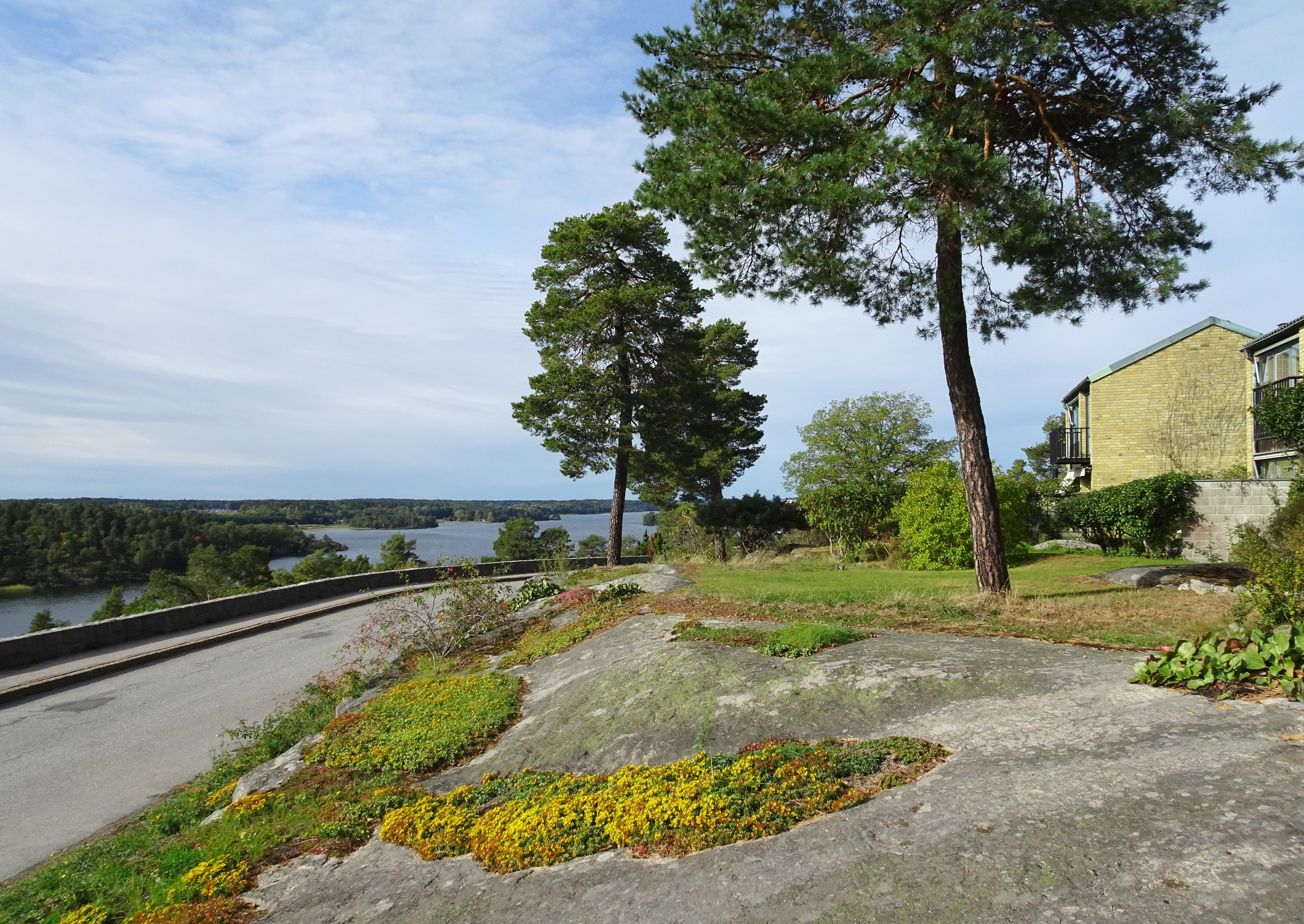 Radhusområdet "Mälarblick" i Nockebyhov, arkitekt Gösta Nordin